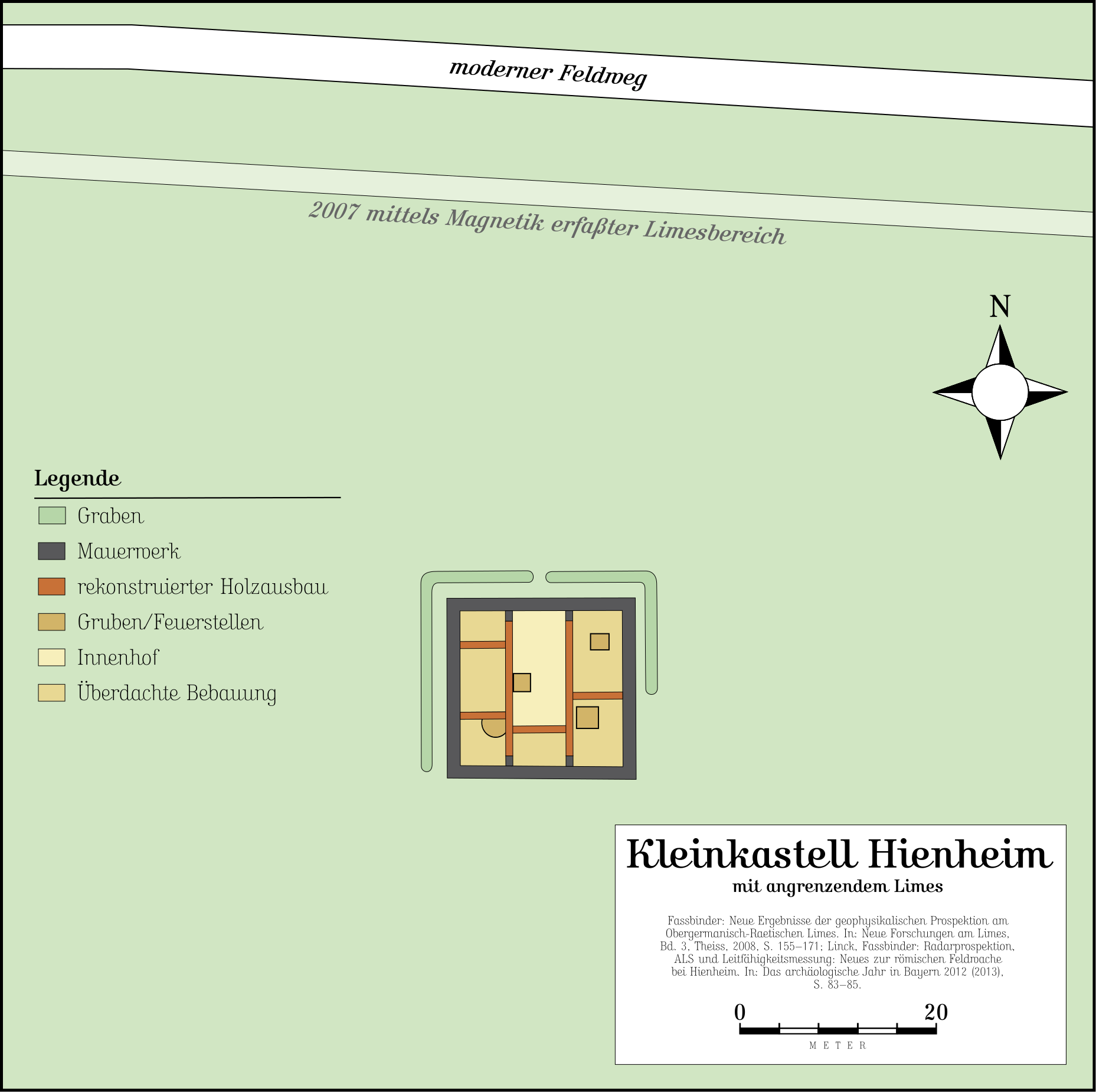 Kleinkastell Hienheim, Raetischer Limes, Stadt Neustadt a. d. Donau, Landkreis Kelheim, Niederbayern. Die Quellenangeben zu dieser Zeichnung befinden sich im Bild selber!